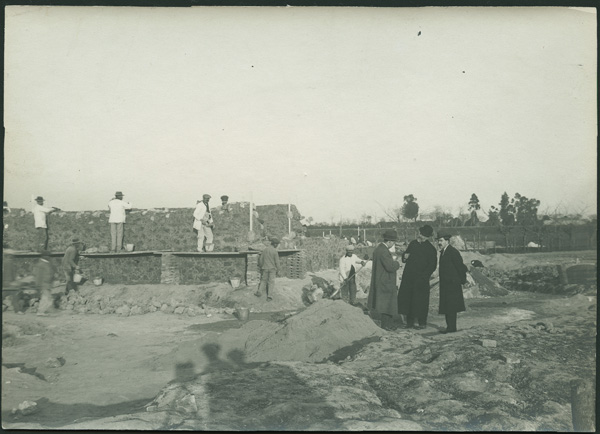 Fotografía, copia positiva. Benigno de la Vega-Inclán y Vicente Traver a las obras de las Casas Baratas de Sevilla.